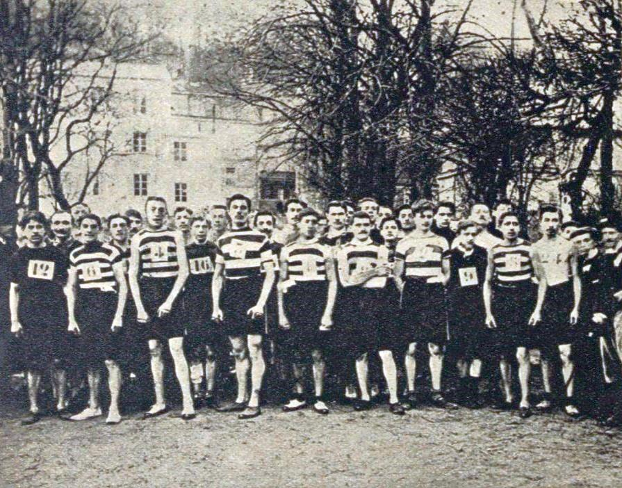 Le départ du championnat de France de Cross-coutry (le 'National'), en 1900 (n°4 Albert Champoudry vainqueur).